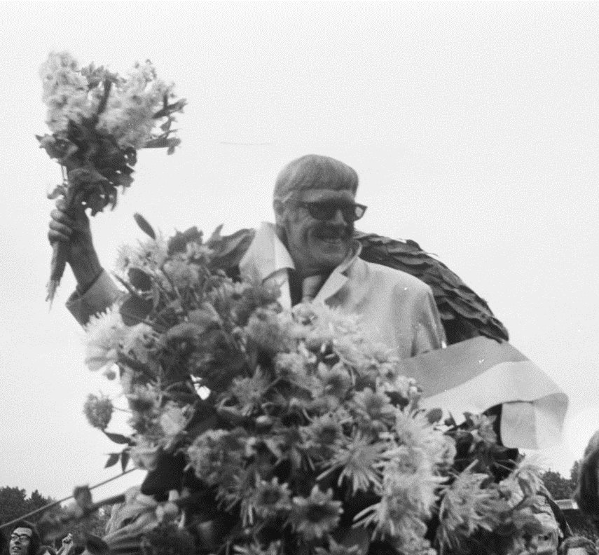 Eindhoven-FC Groningen 4-1; promotie van Eindhoven naar de Eredivisie. Trainer Rinus Gosens (Eindhoven) op de schouders.